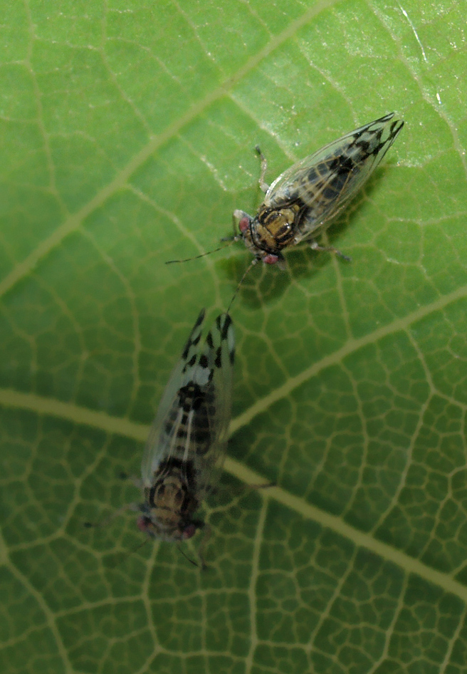 Cacopsylla pulchella (Psyllidae) sobre hojas de Cercis siliquastrum. Madrid, barrio de Peñagrande.